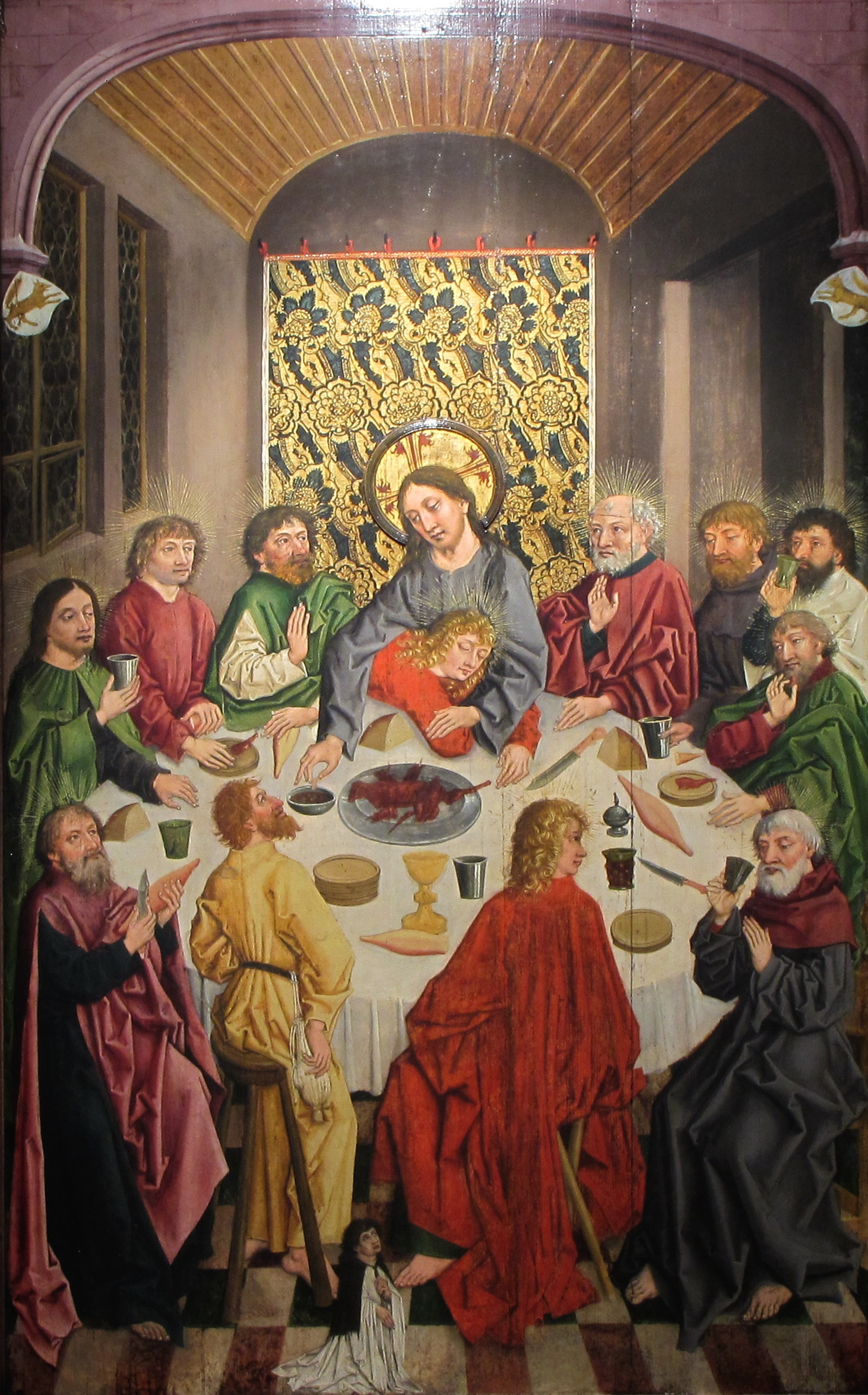 La Cène